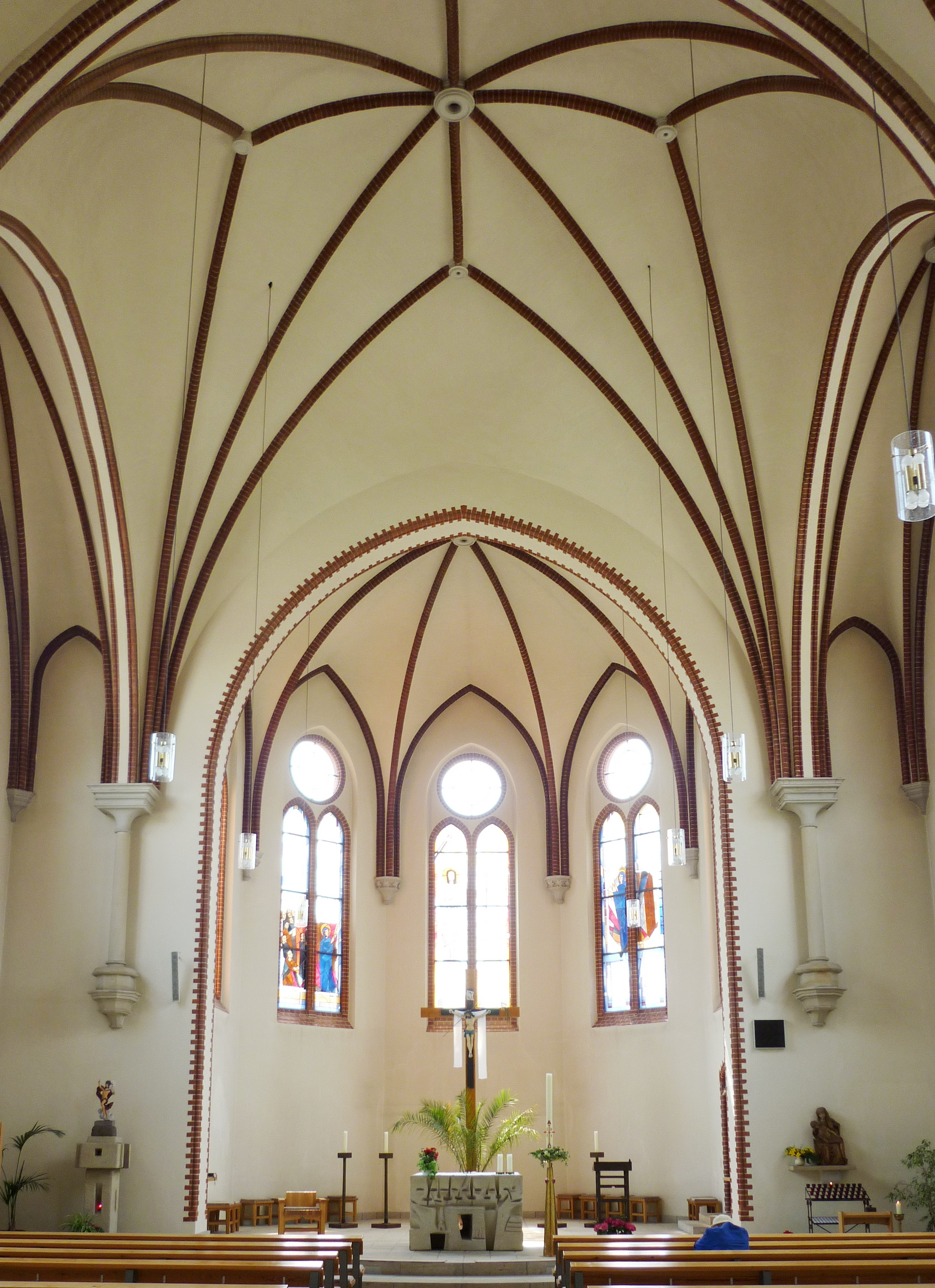 Schwedt/Oder, kath. Kirche St. Mariä Himmelfahrt, Inneres